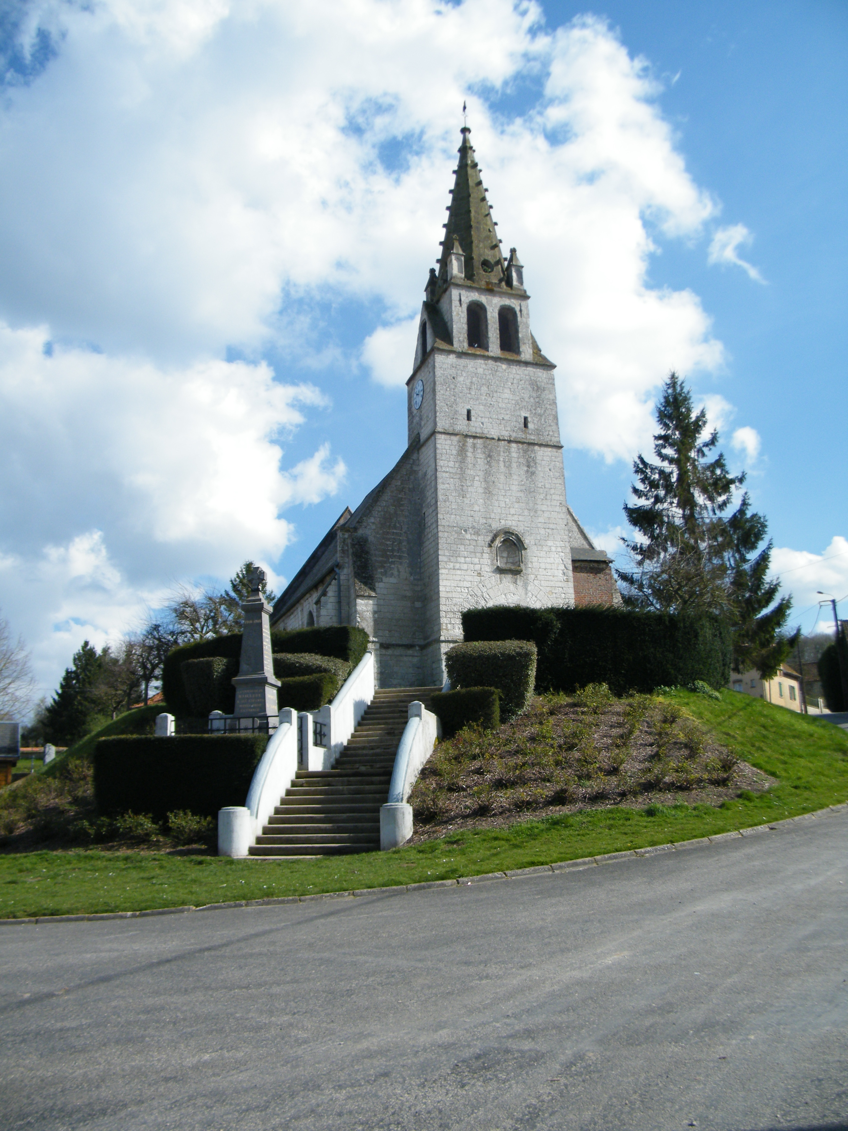 L'église, sur son promontoire.